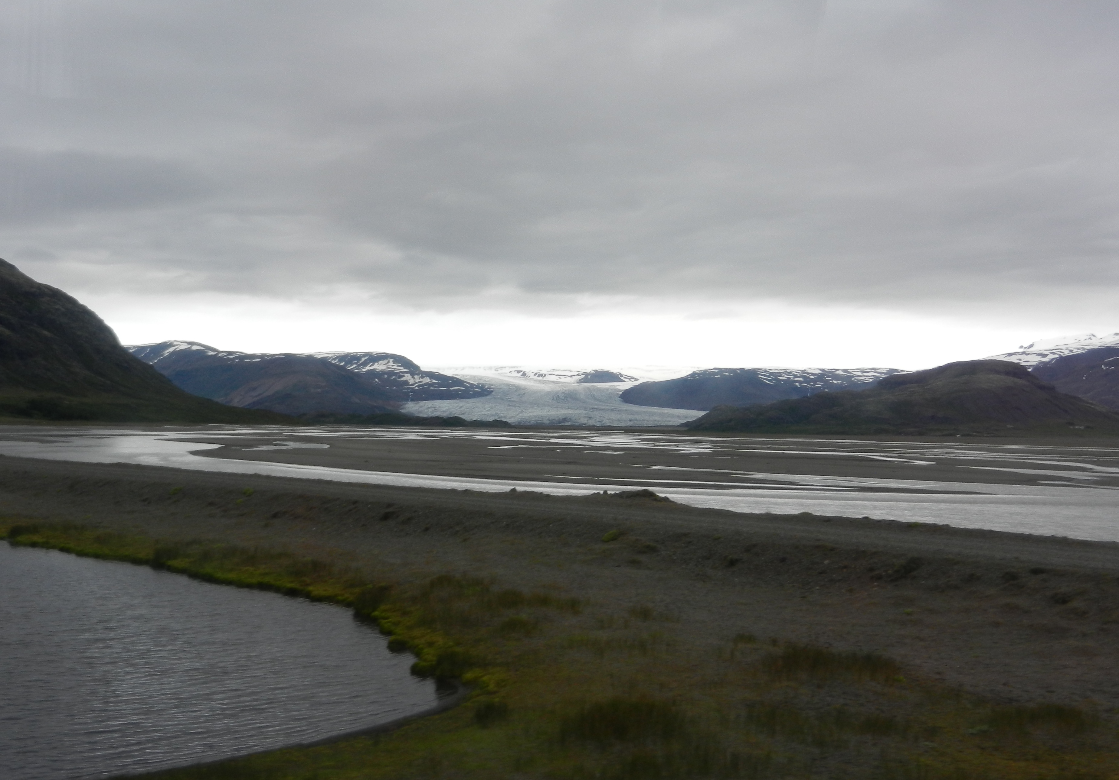 Pogled na sandur, v ozadju jezik ledenika Vatnajökull, Islandija.